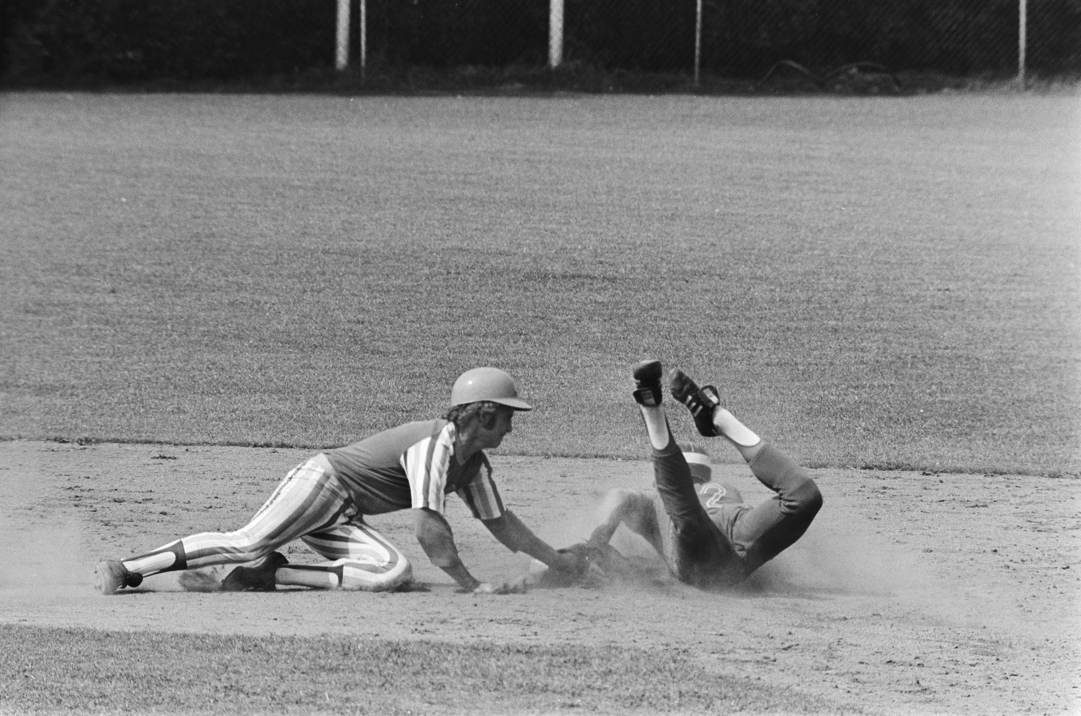 Collectie / Archief : Fotocollectie Anefo Reportage / Serie : [ onbekend ] Beschrijving : Honkbal Amstel Tijgers tegen Wera Kinheim ; een van de mannen van Kinheim wordt uitgetikt door korte stop Jimmy Sieval Datum : 29 juli 1978 Locatie : Amsterdam, Noord-Holland Trefwoorden : honkbal, sport Persoonsnaam : Amstel Tijgers, Sieval Jimmy, Wera Kinheim Fotograaf : Peters, Hans / Anefo Auteursrechthebbende : Nationaal Archief Materiaalsoort : Negatief (zwart/wit) Nummer archiefinventaris : bekijk toegang 2.24.01.05 Bestanddeelnummer : 929-8381